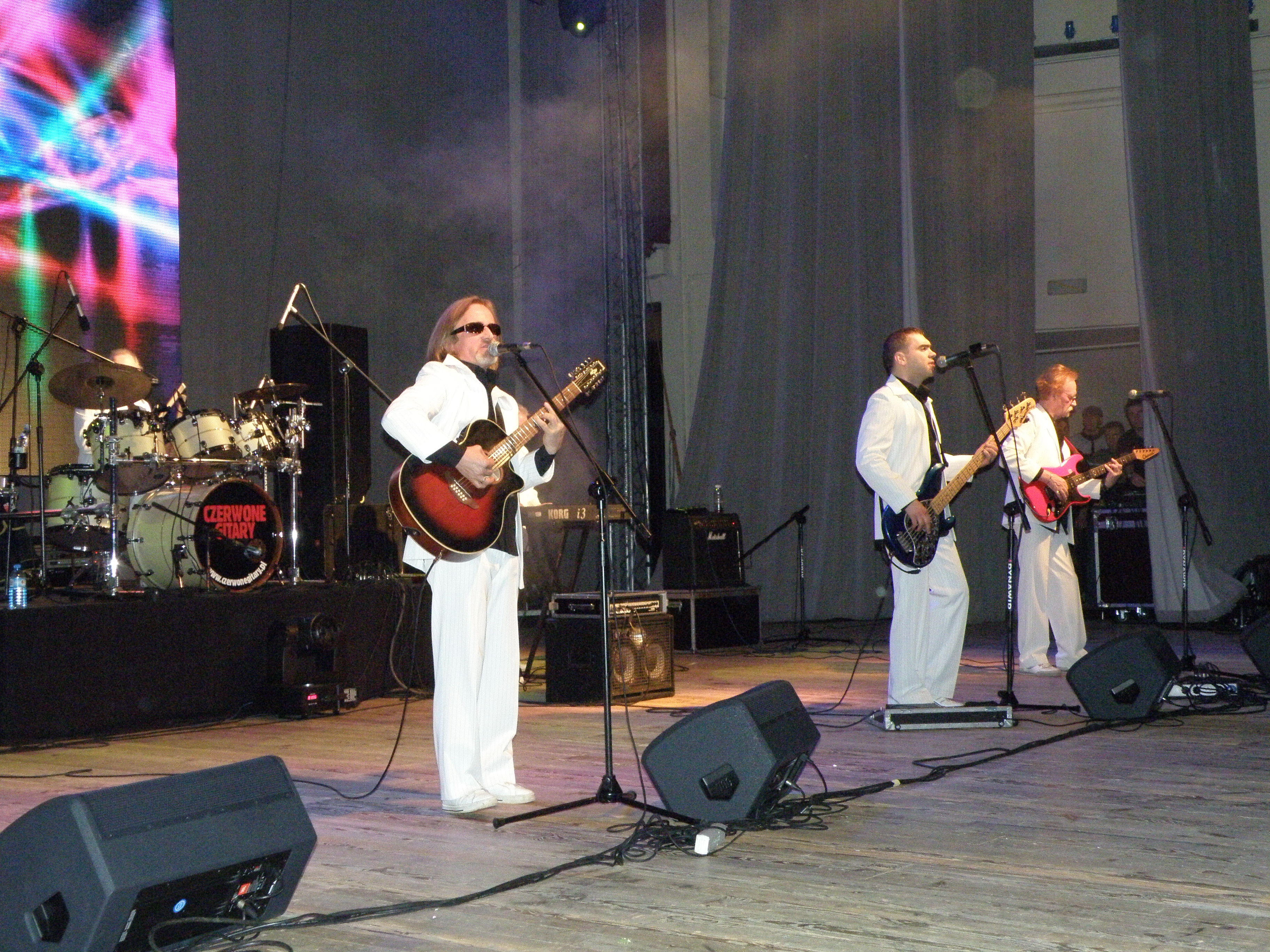 Czerwone Gitary. Koncert z okazji Dnia Kolejarza 2009 w Sali Kongresowej.